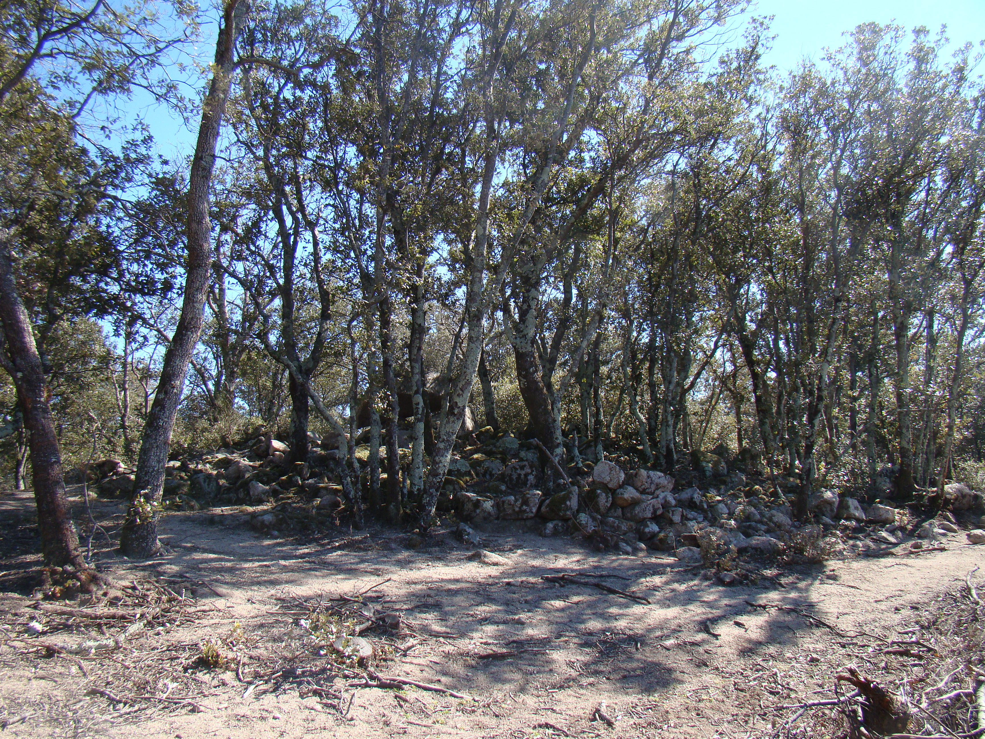 Dolmen Caixa de Rottlan